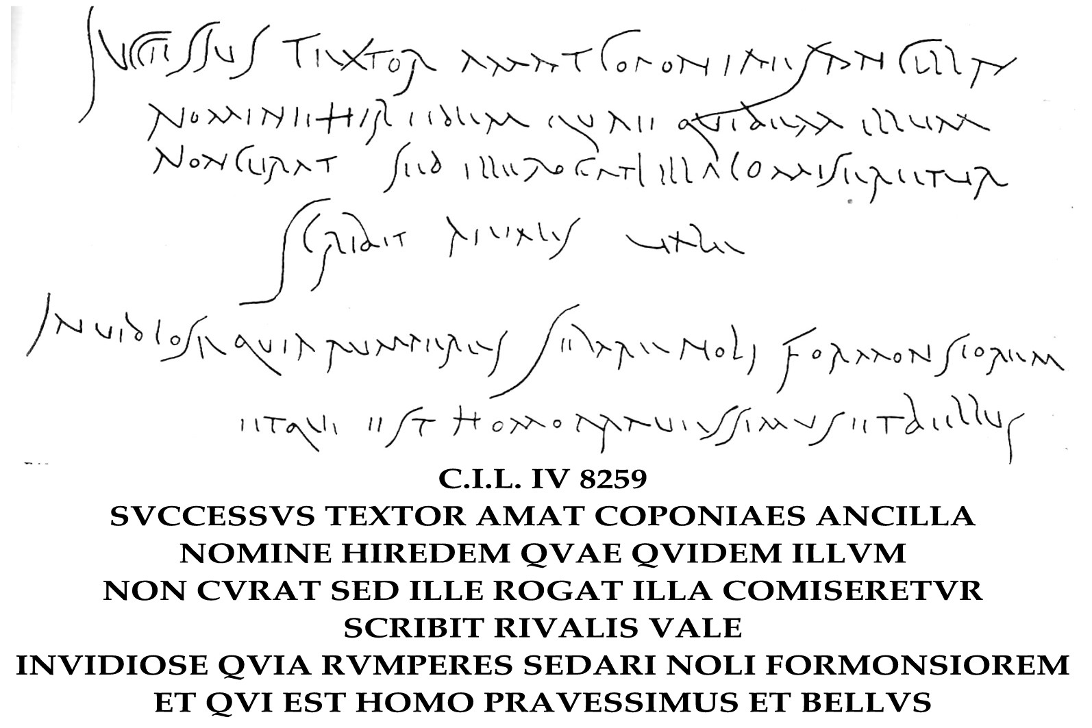 Inscripción pompeyana. Traducción: "El tejedor Sucesus ama a la esclava de la mesonera, de nombre Iris, la cual no se preocupa por él". Fuente